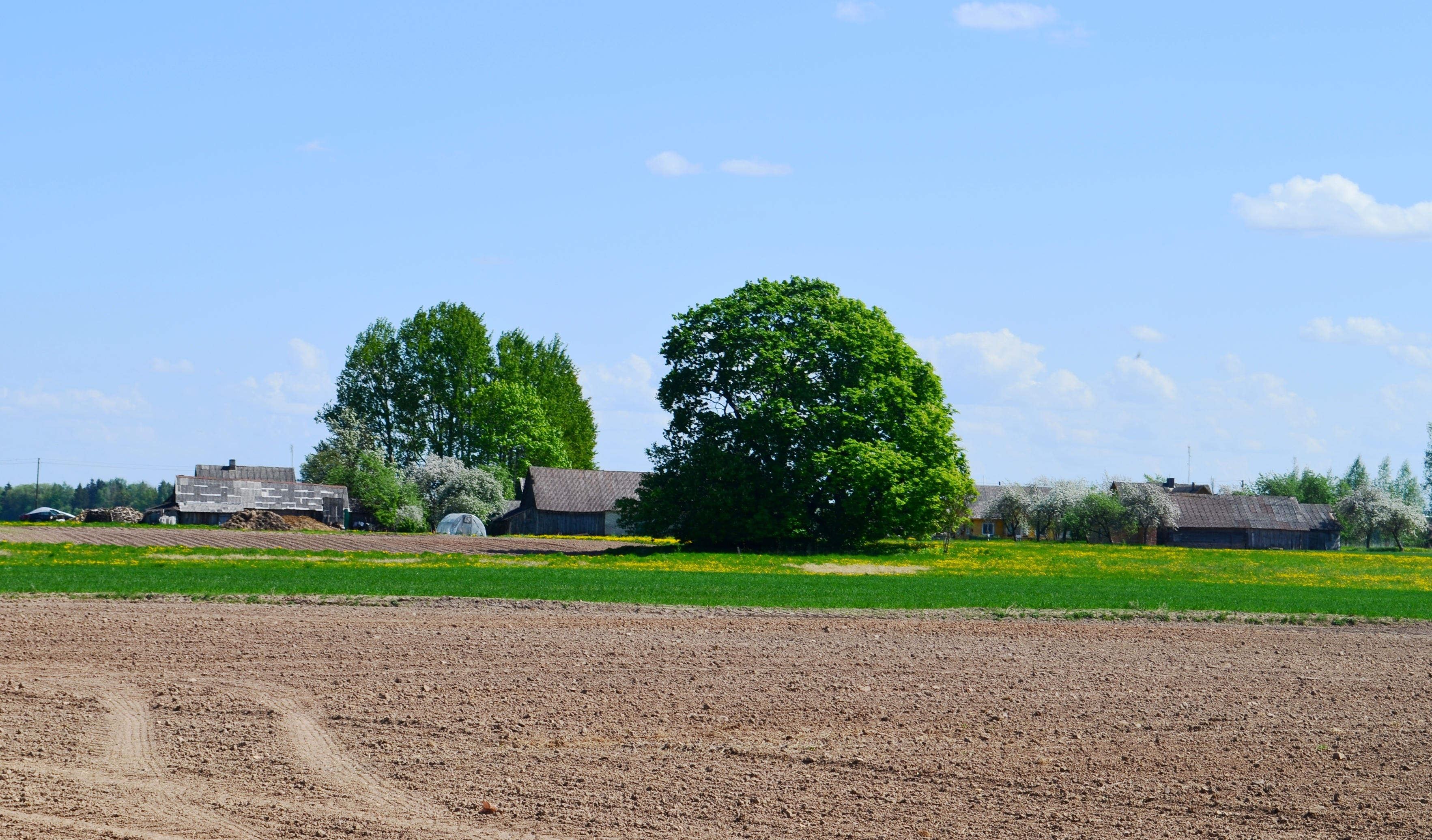 Medžiočiai, Kavarsko sen., Anykščių raj.